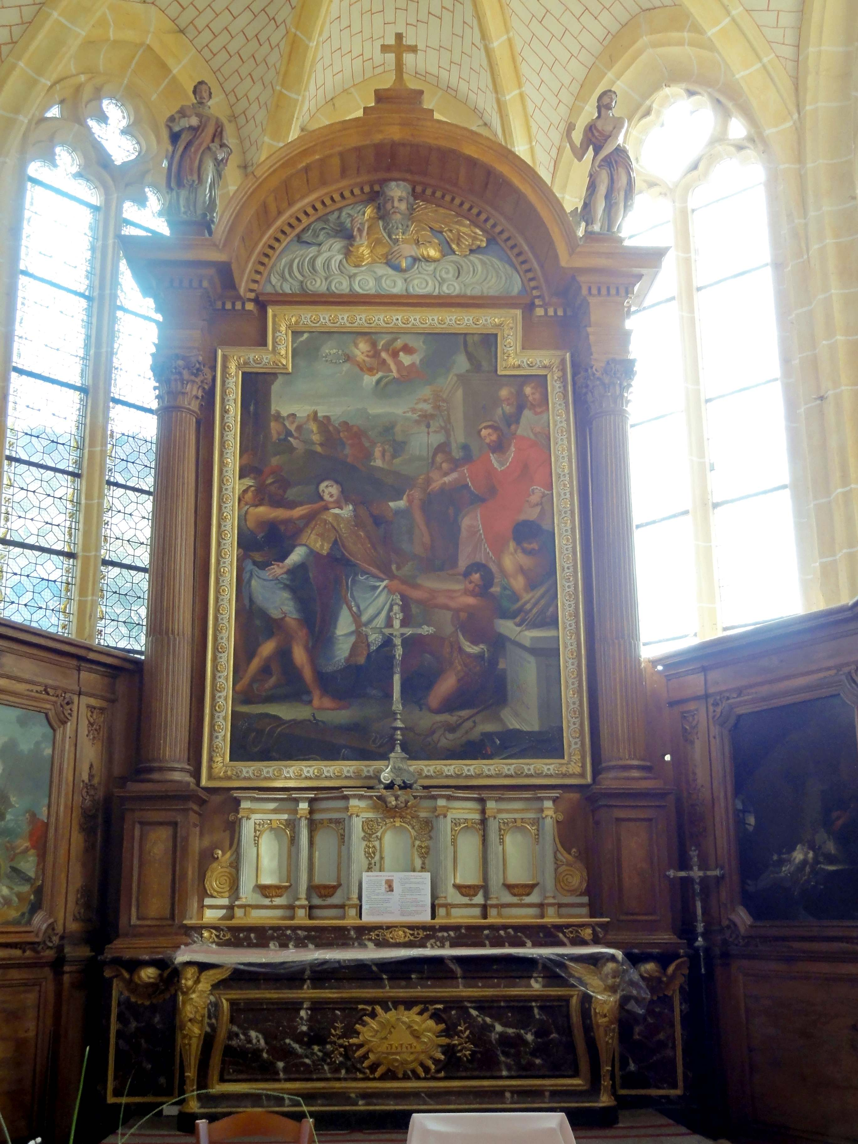 Mobilier de l'église (voir titre).